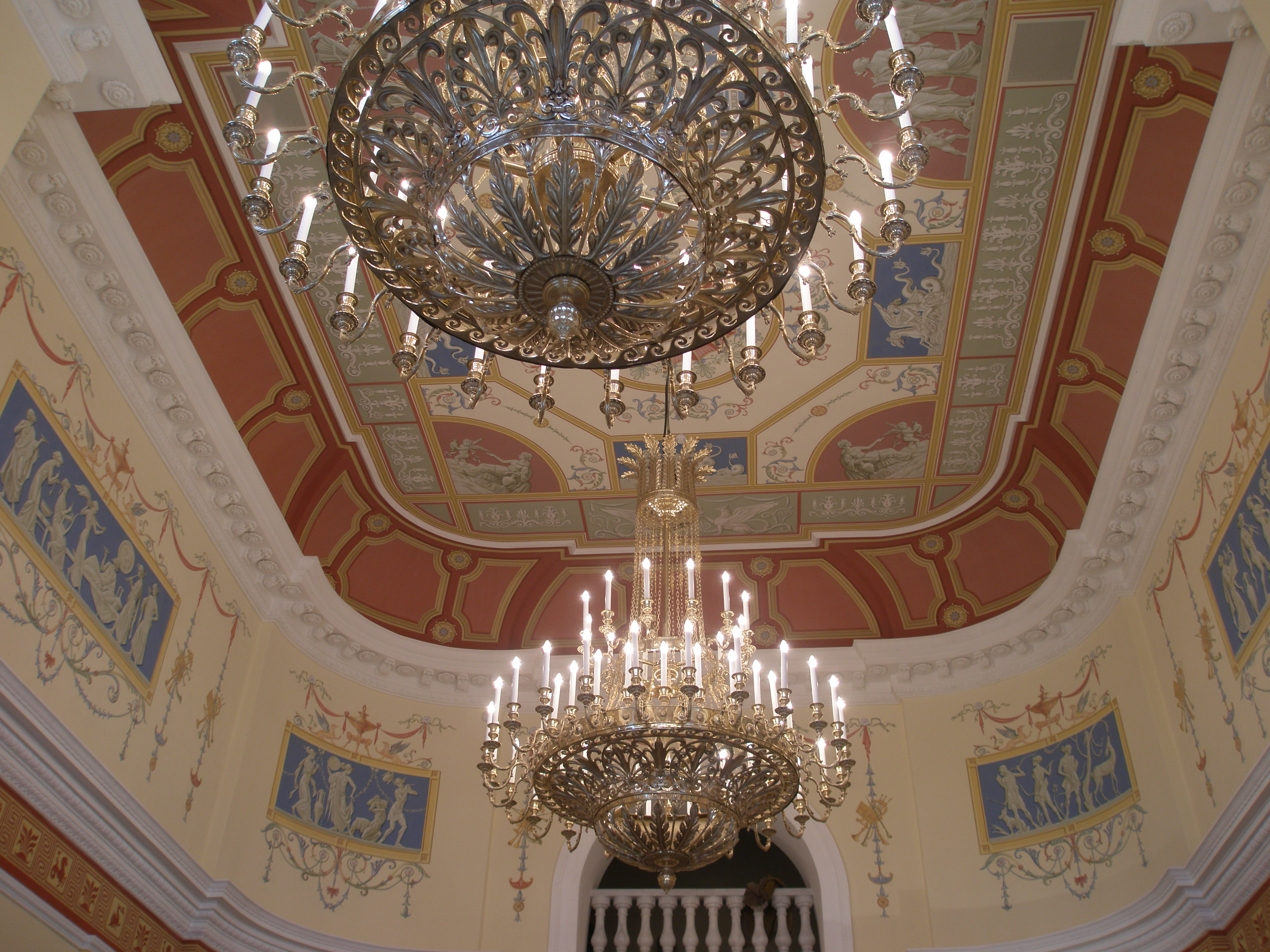 Архітектор Чарльз Камерон. 1799 -1803 Стиль - класицизм